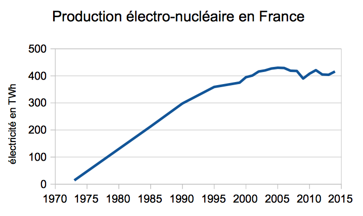 Évolution de la production nette d'électricité d'origine nucléaire en France. Données provenant de : RTE - Bilan électrique 2014, 26 janvier 2015 (